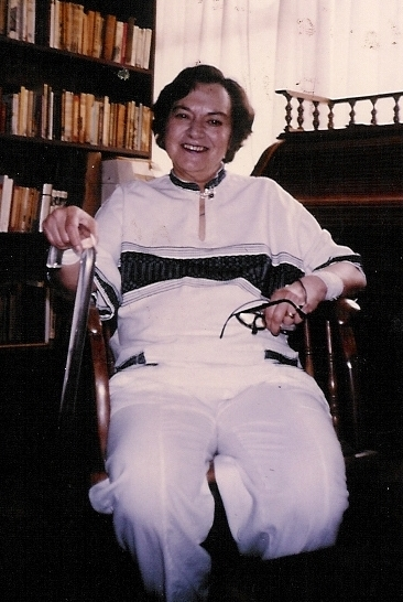 La escritora y cuentista mexicana, Inés Arredondo (1928-1989), en su departamento en México, D.F.